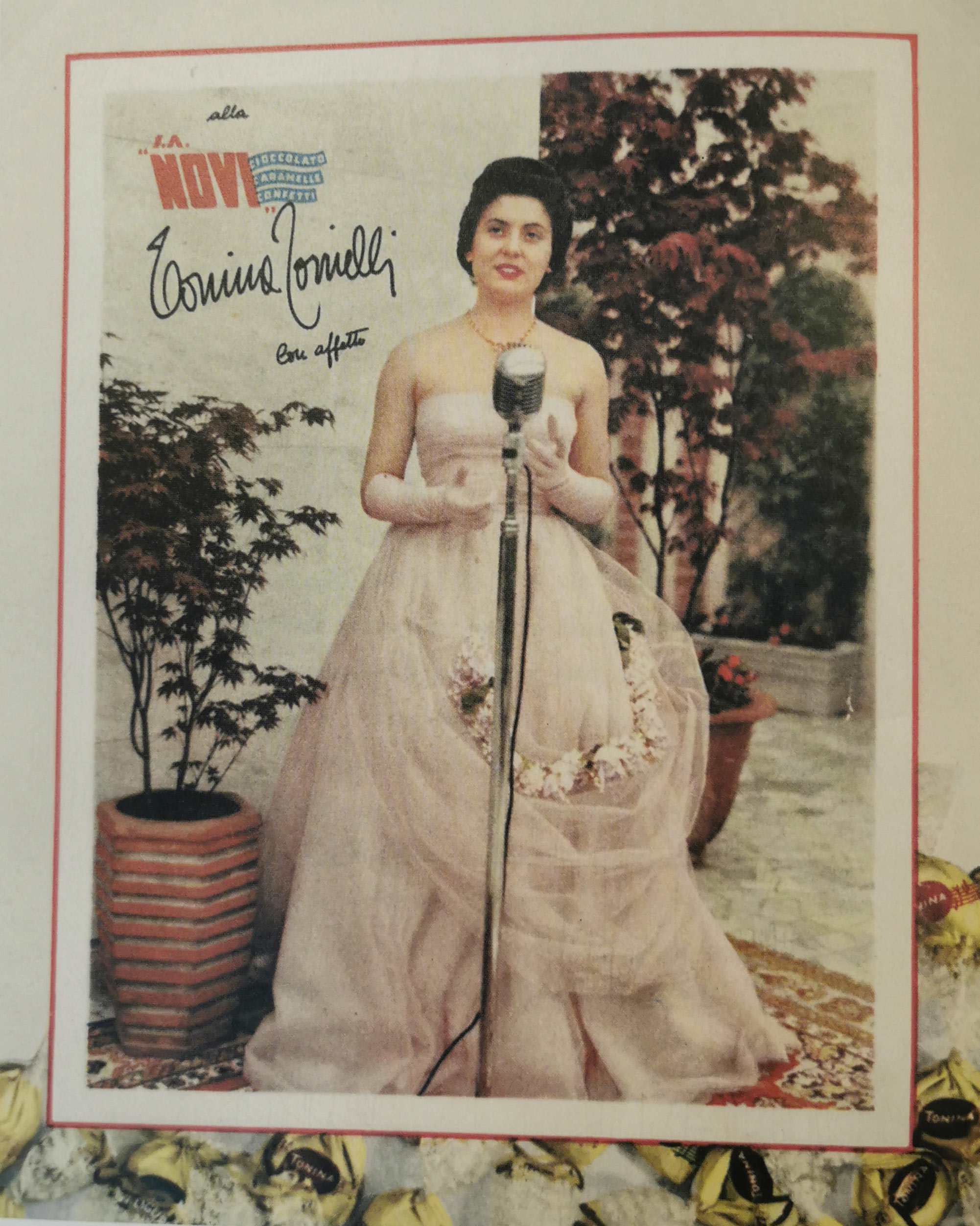 La cartolina con dedica inviata da Tonina Torrielli alla Novi, azienda dolciaria per la quale lavorava prima della carriera musicale.